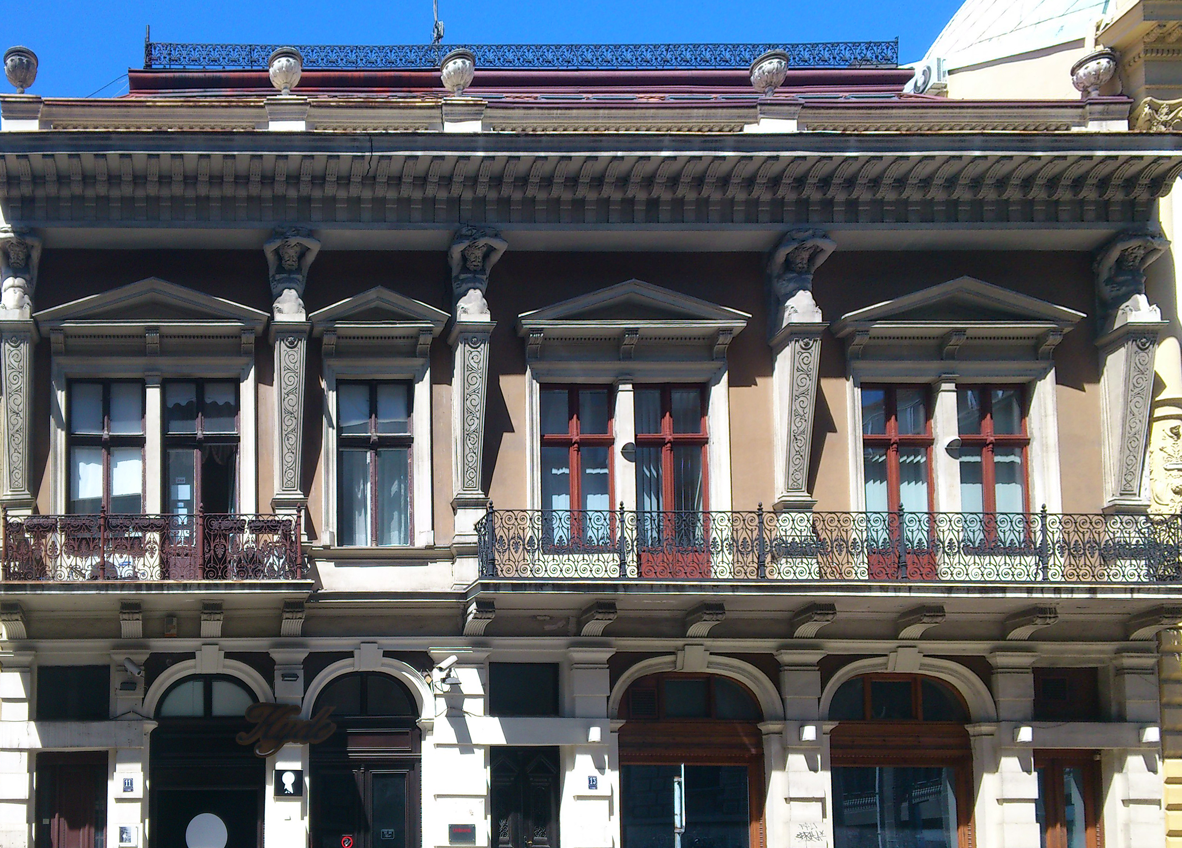 Beograd Kuća Milorada Pavlovića Kralja Petra 11-13